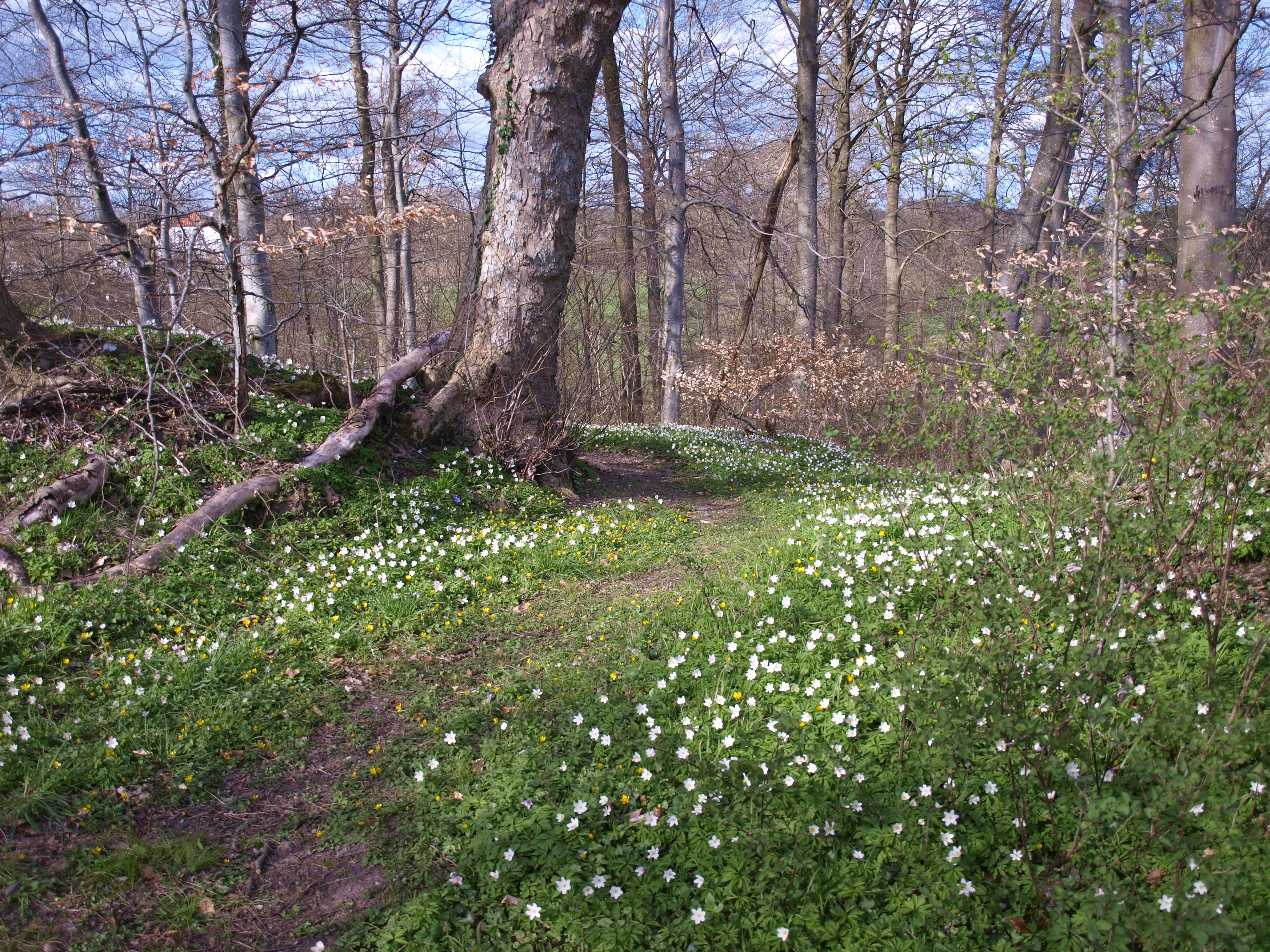 Påby Enge, 17. april 2015